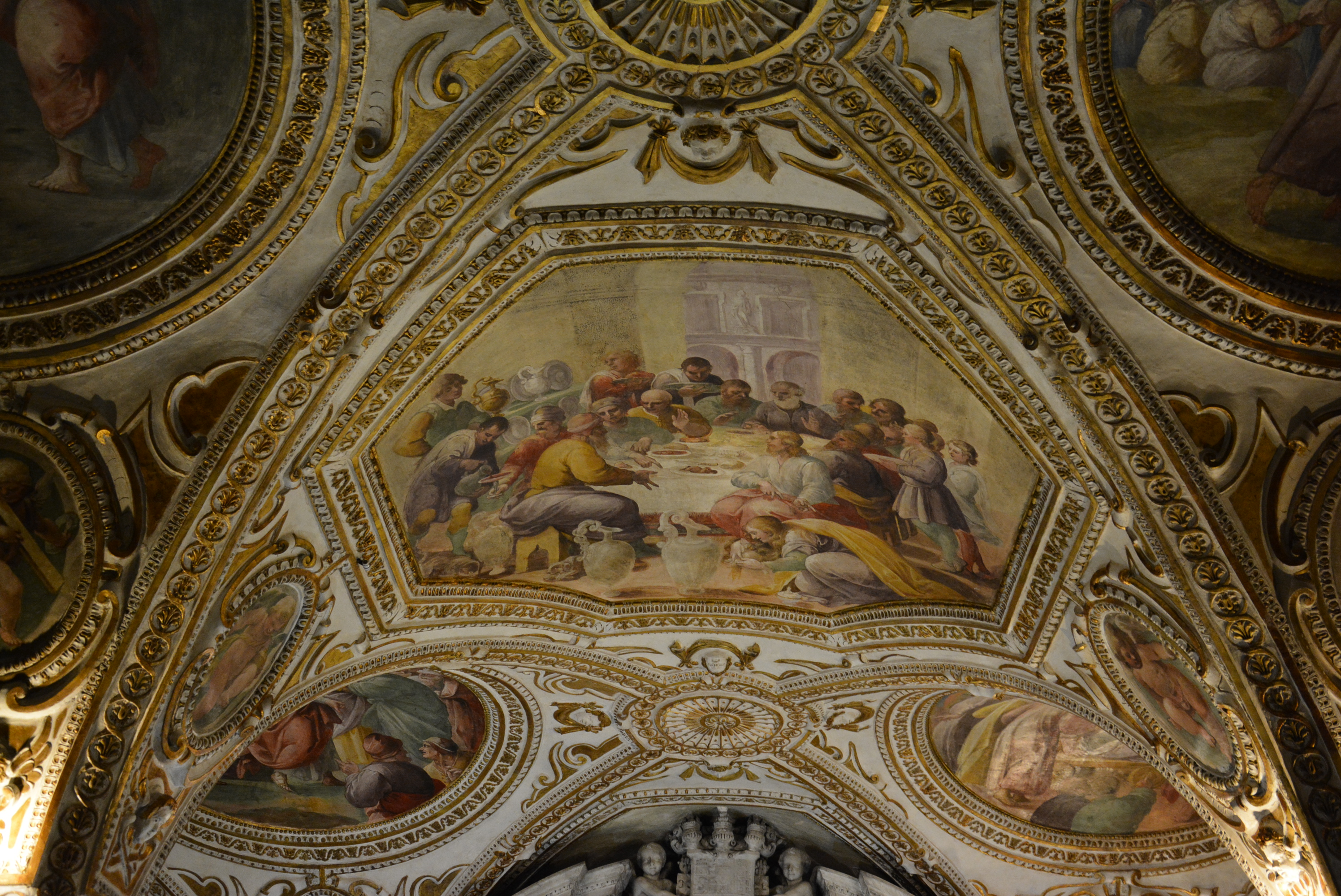 Cripta della cattedrale di Salerno